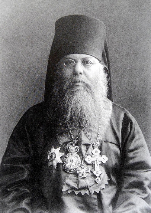 Леонид Окропиридзе